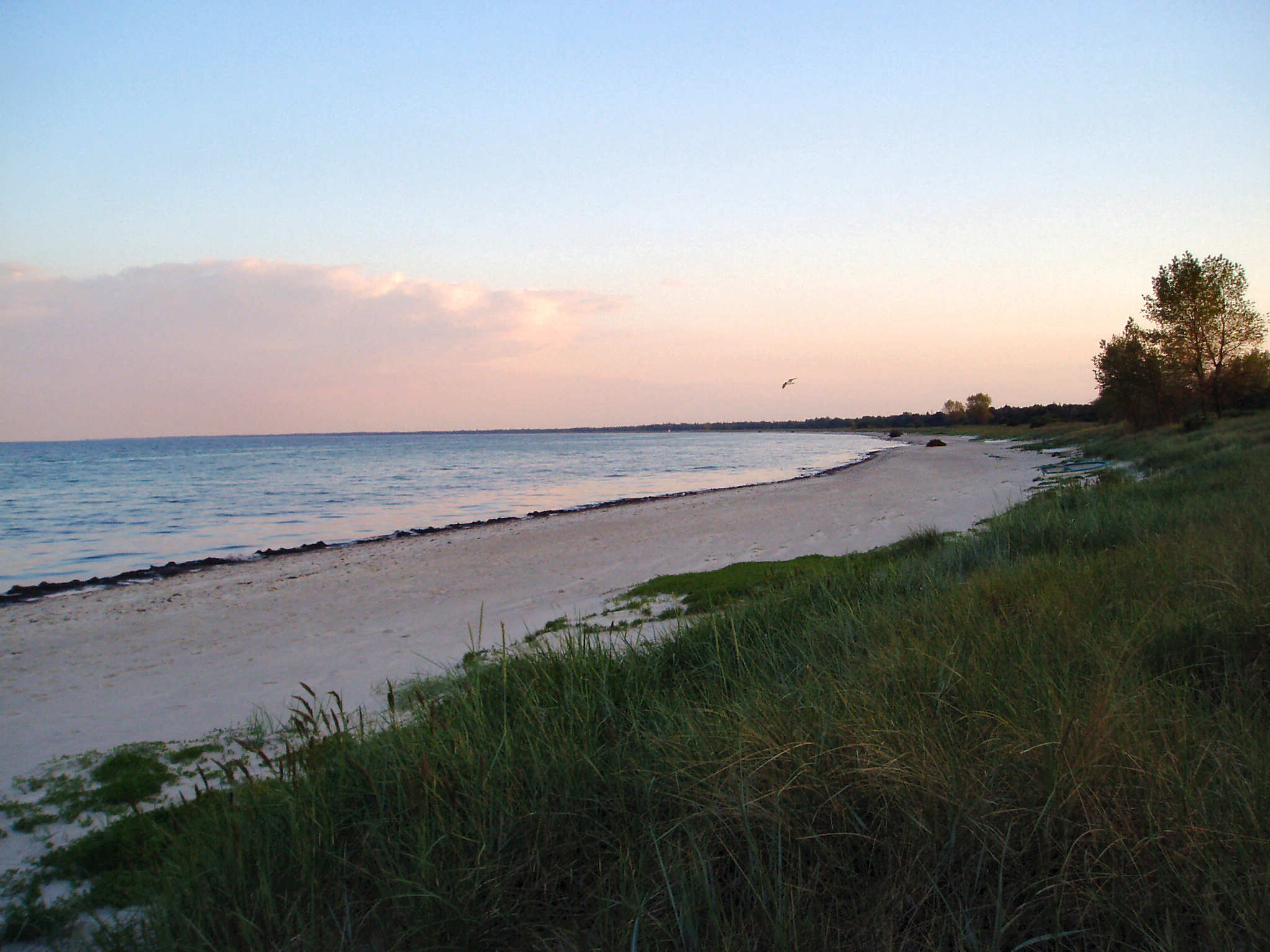 Strand von Marielyst, Falster, Dänemark.